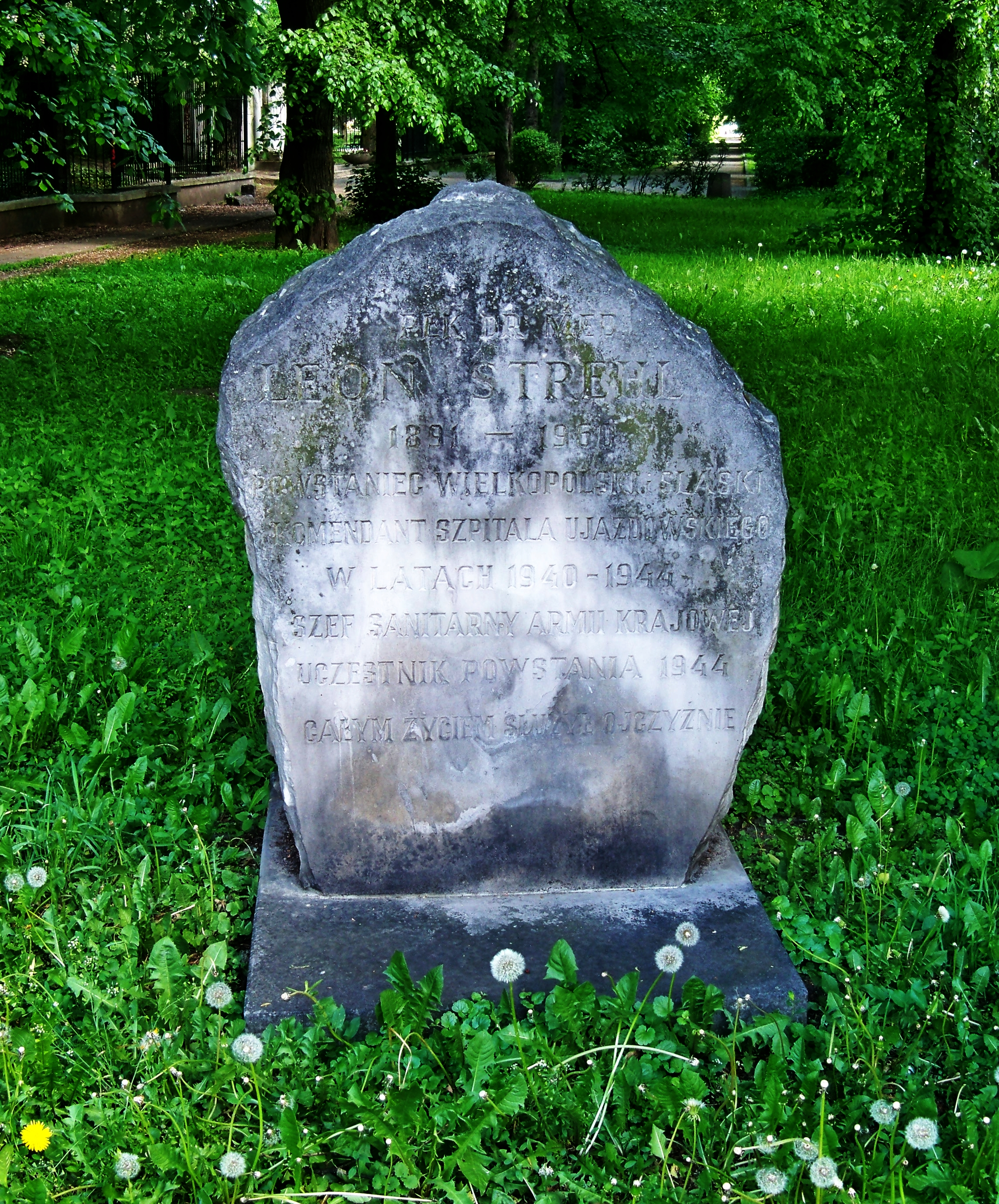 Głaz upamiętniający płk. dr. med. Leona Strehla na skwerze jego imienia w pobliżu ul. Jazdów 6 w Warszawie